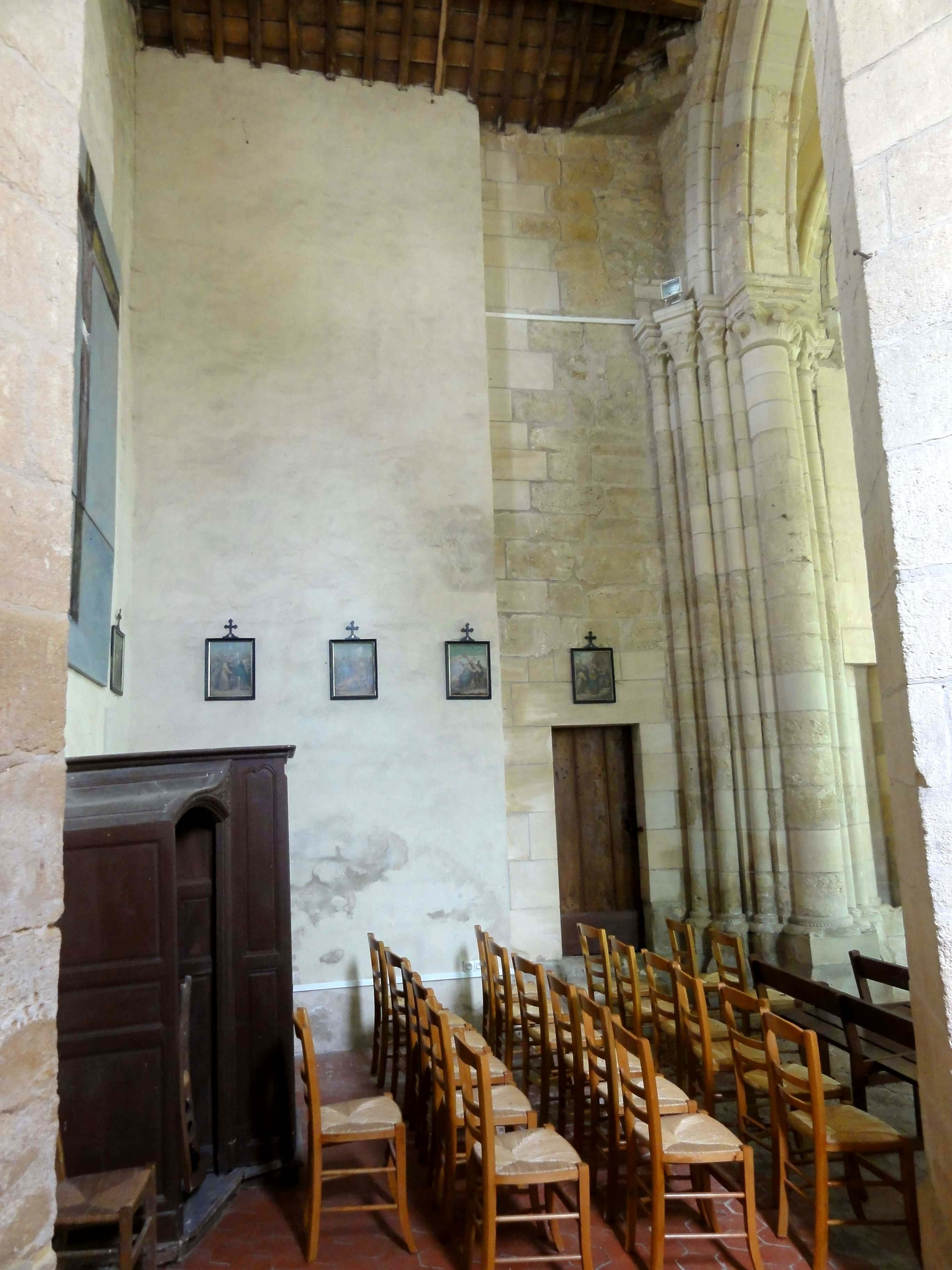 Intérieur de l'église (voir titre).